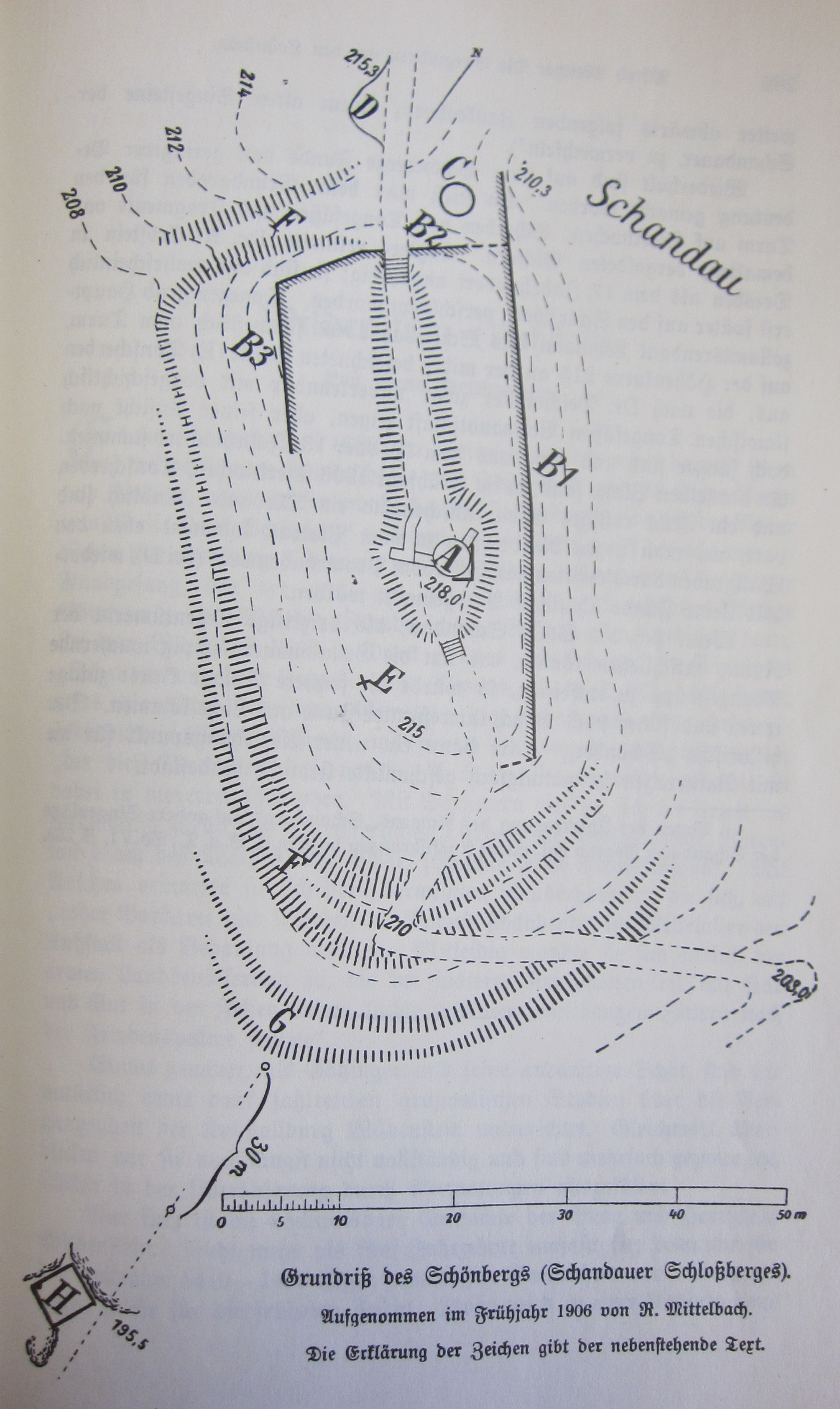 Grundriß des Schönbergs (Schandauer Schloßberges) Aufgenommen im Frühjahr 1906 von R. Mittelbach